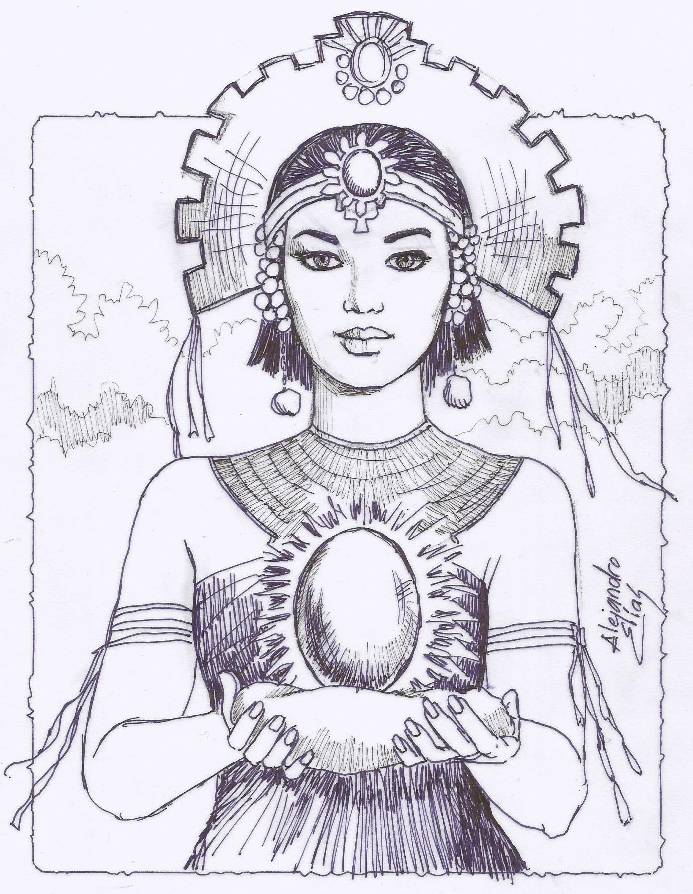 Leyenda ecuatoriana